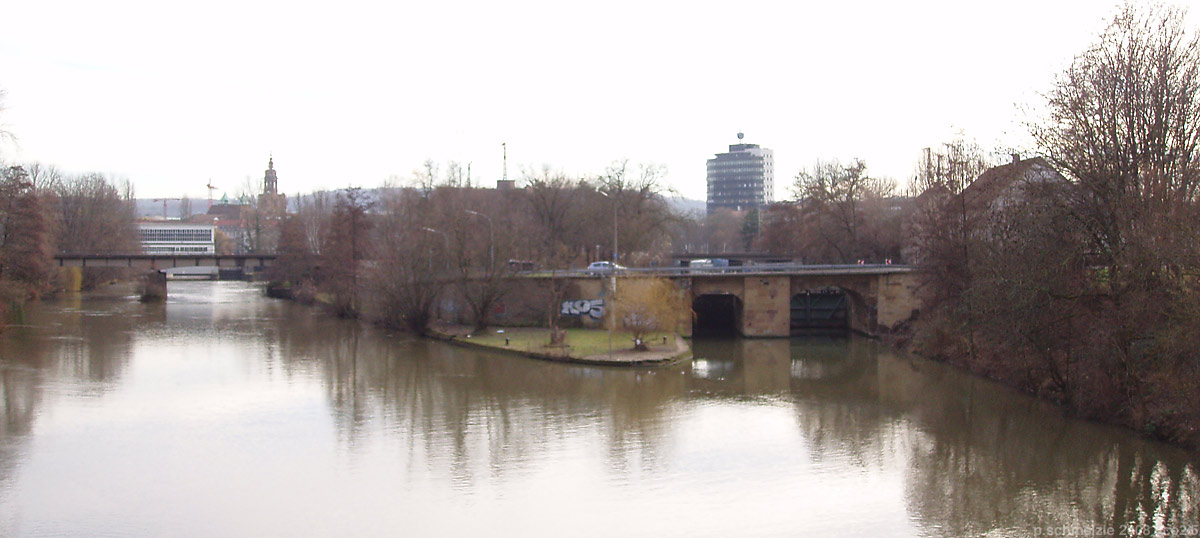 Mündung des im 19. Jhd. erbauten Wilhelmskanals (rechts) in den Alt-Neckar (links) in Heilbronn. Mit dem Wilhelmskanal wurde der zuvor bei Heilbronn für die Schiffahrt unterbrochene Neckar durchgängig schiffbar. Die Schleusenbrücke ist noch weitgehend original.